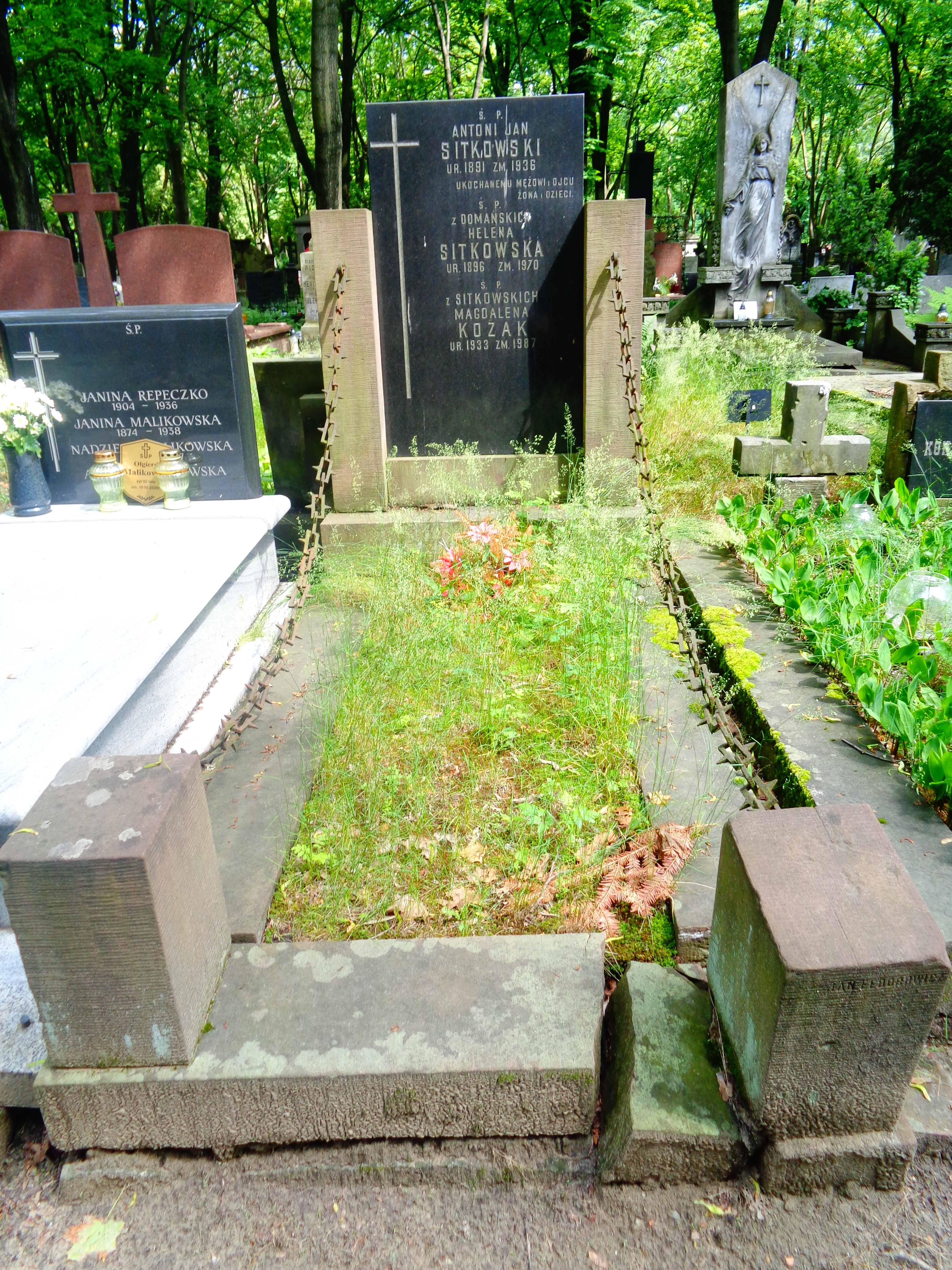 Grób Antoniego Sitkowskiego na Cmentarzu Powązkowskim